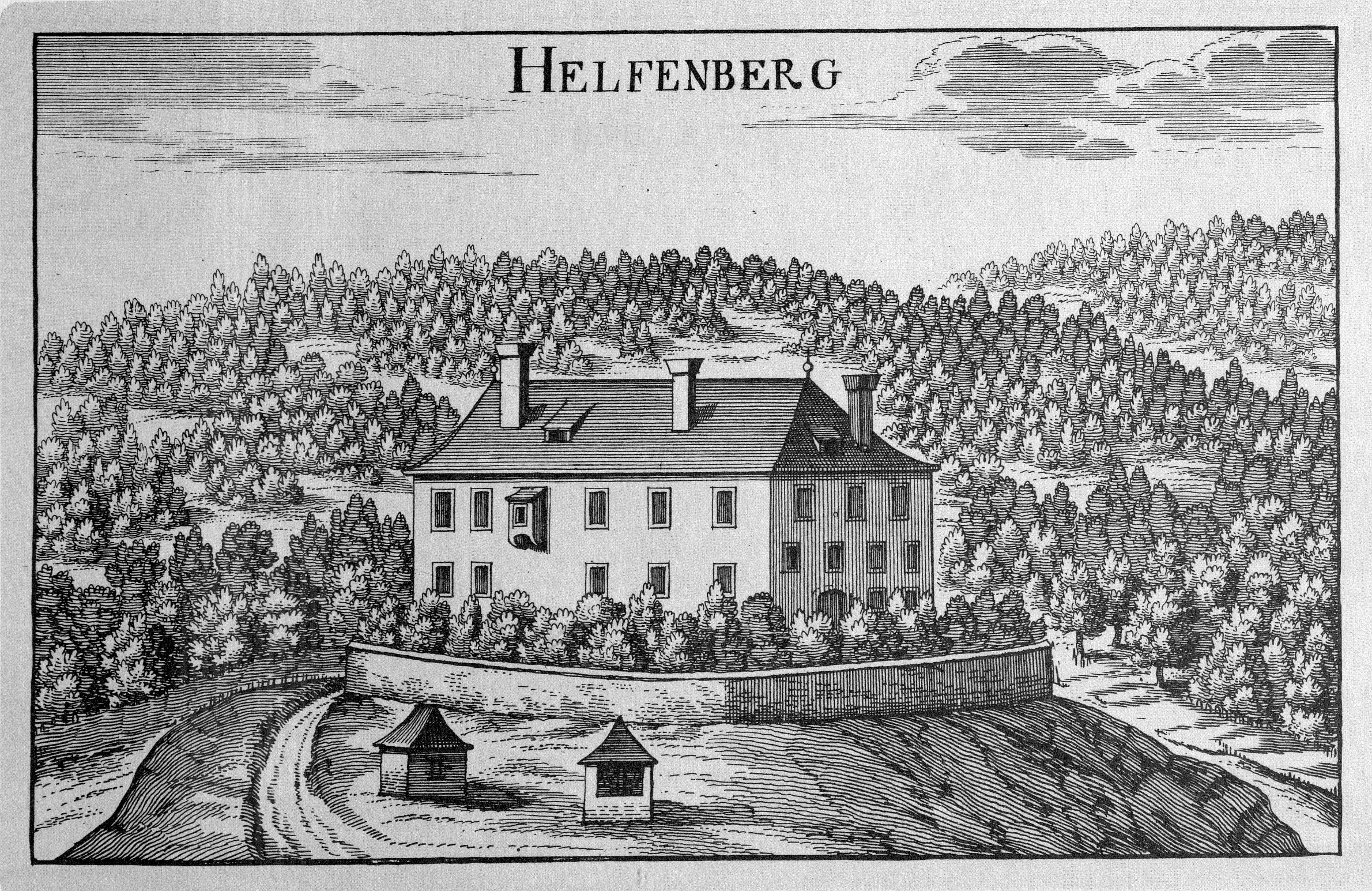 G. M. Vischers Käyserlichen Geographi, Topographia Ducatus Stiriae, Das ist: Eigentliche Delineation / und Abbildung aller Städte / Schlösser / Marcktfleck / Lustgärten / Probsteyen / Stiffter / Clöster und Kirchen / so es sich im Herzogthumb Steyrmarck befinden; Und anjetzo Umb einen billichen Preyß zu finden seynd Bey Johann Bitsch Universitäts Buchhandlern / Auff dem Juden=Platz bey der guldenen Saulen. Graz 1681 Die Nummerierung der Dateien folgt der alphabetischen Reihung der Ortsnamen